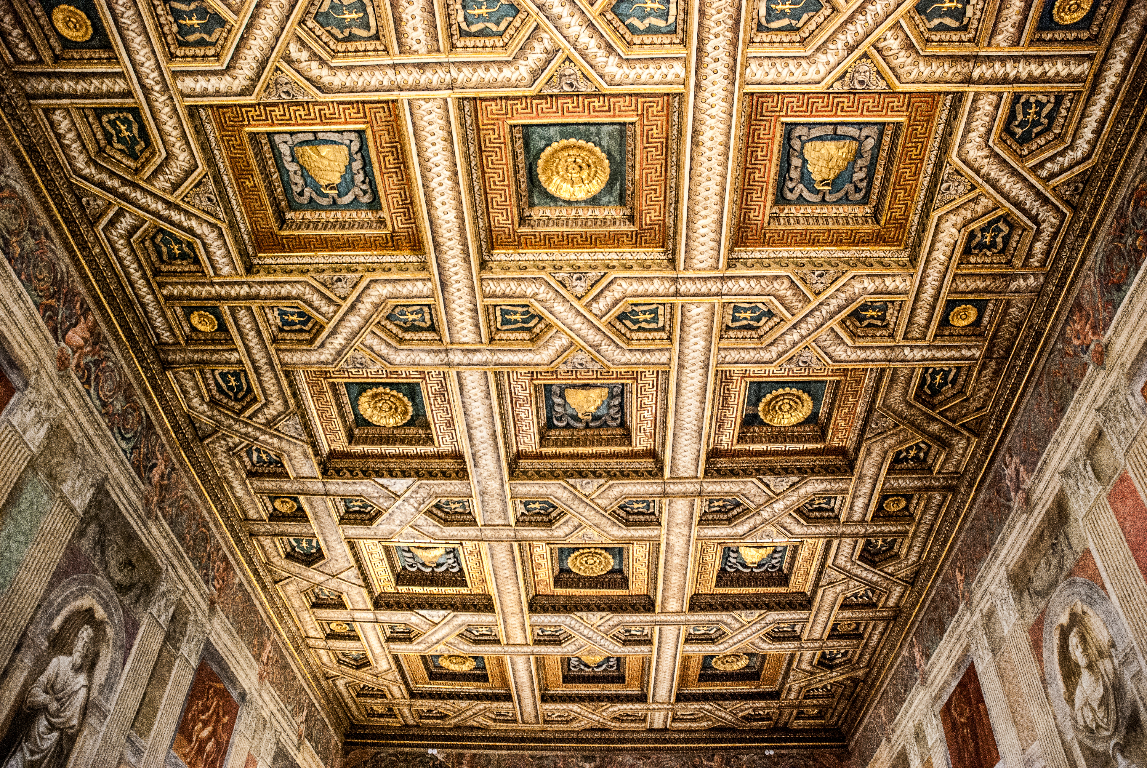 Il soffitto ligneo con le imprese dell'Olimpo